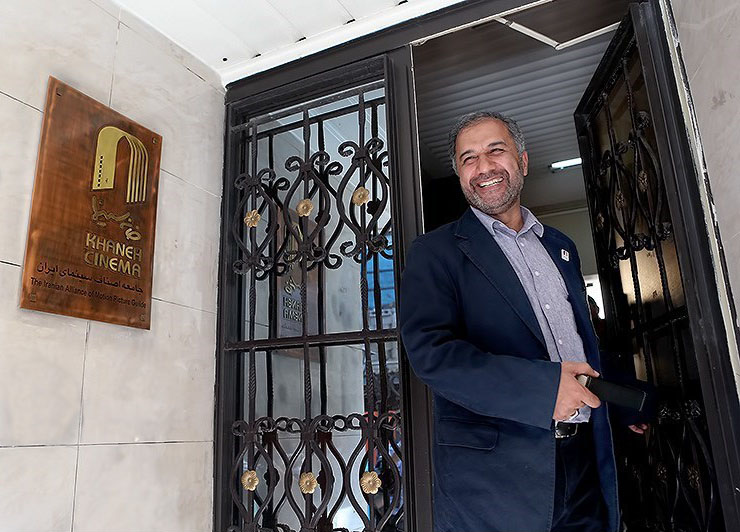 حضور محمدمهدی عسگرپور در خانه سینما به مناسبت بازگشایی مجدد آن به دستور علی جنتی.